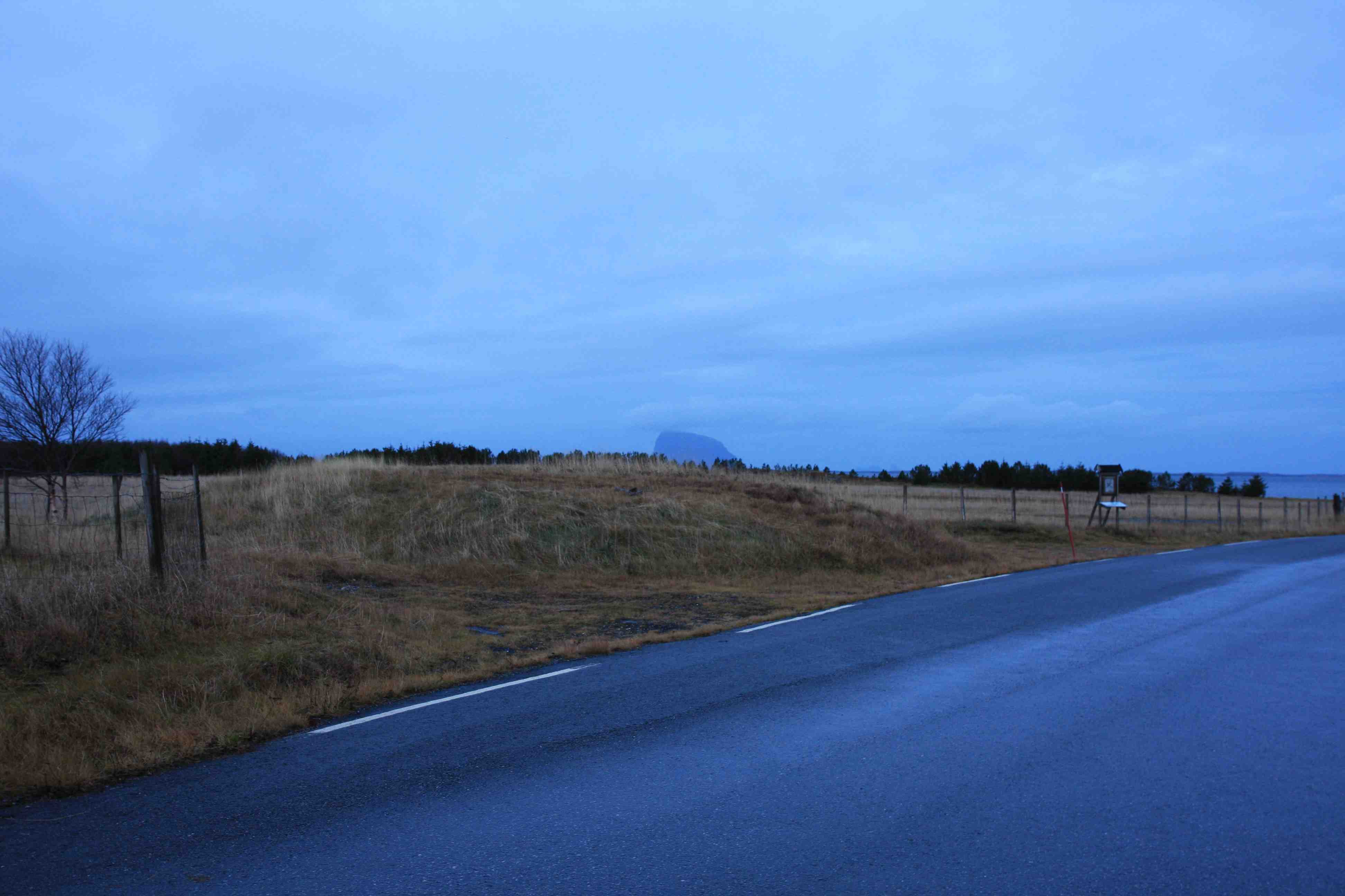 Risegrava på Tomma